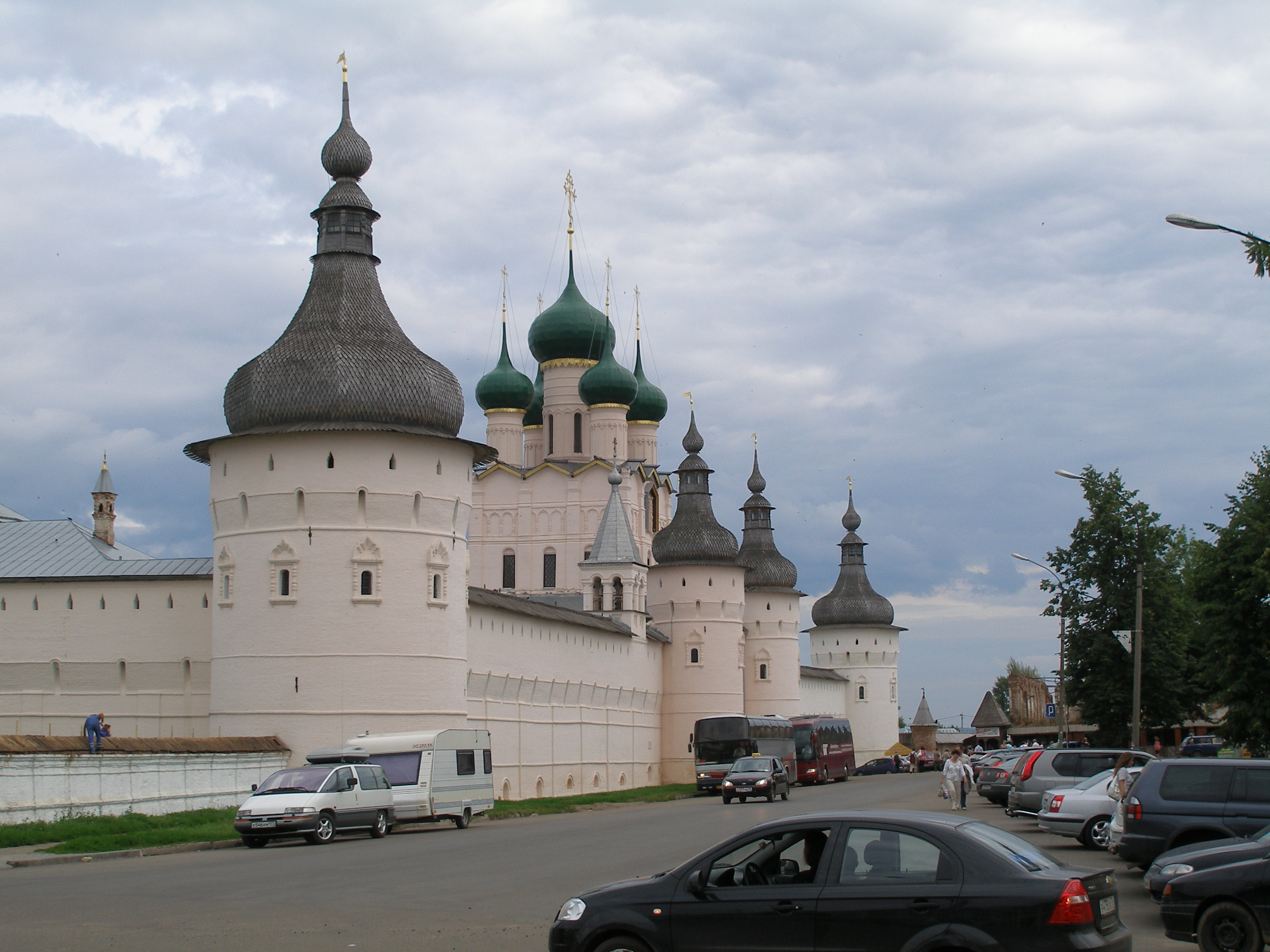 Башни Ростовского кремля